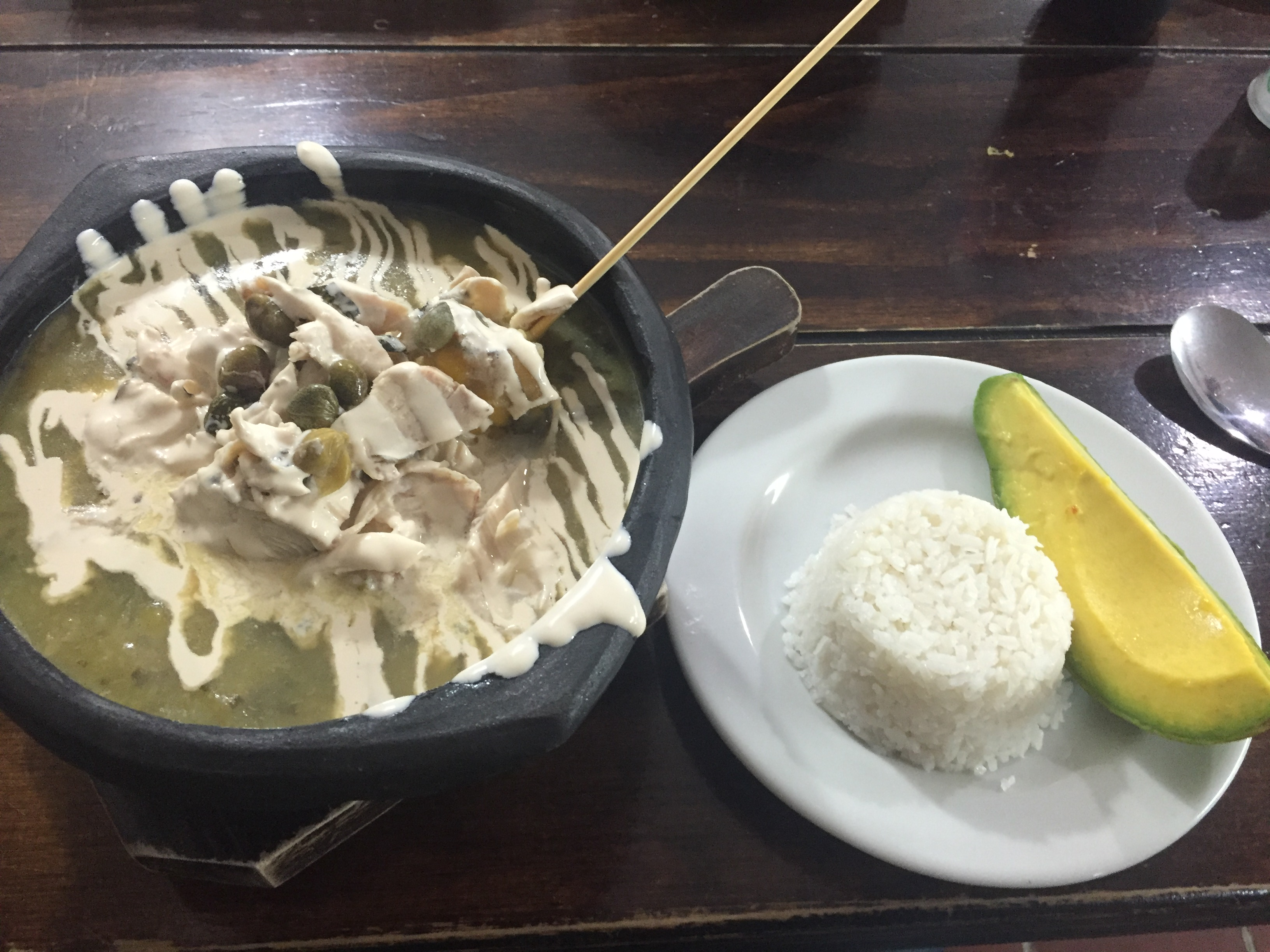 Ajiaco bogotano